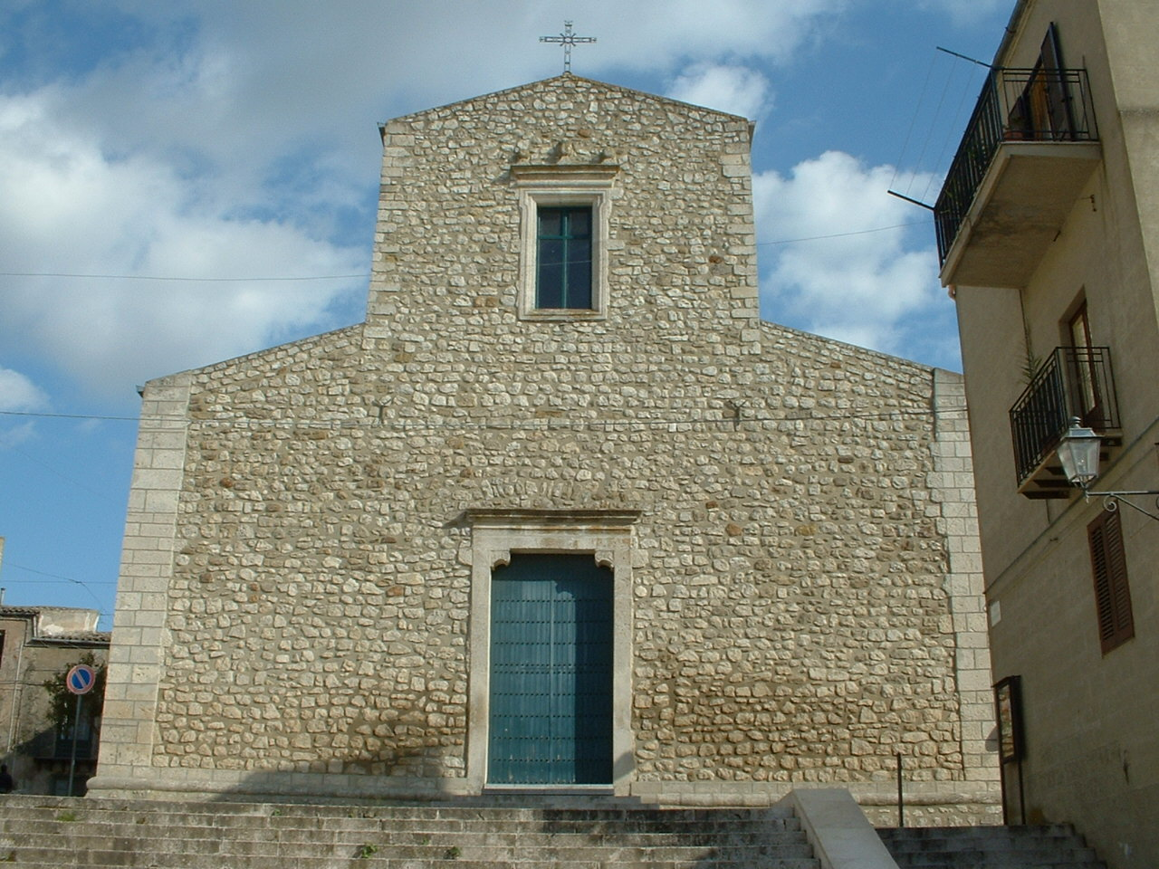 Alimena (PA), Chiesa Madre (1724)